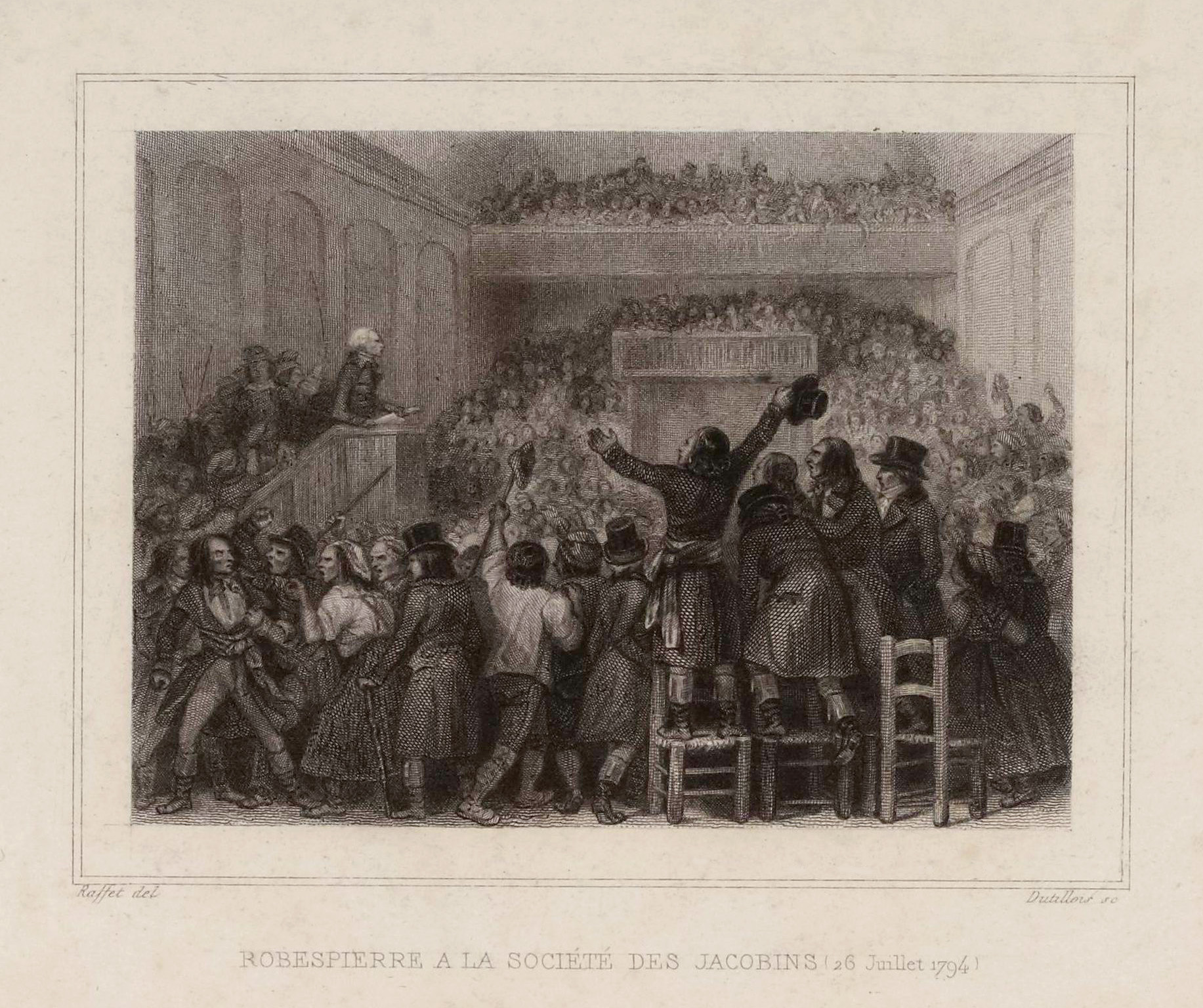 Robespierre à la tribune du club des Jacobins le 8 thermidor an II (26 juillet 1794). Gravure d'Auguste Dutillois d'après un dessin d'Auguste Raffet, Paris, musée Carnavalet, 1834.